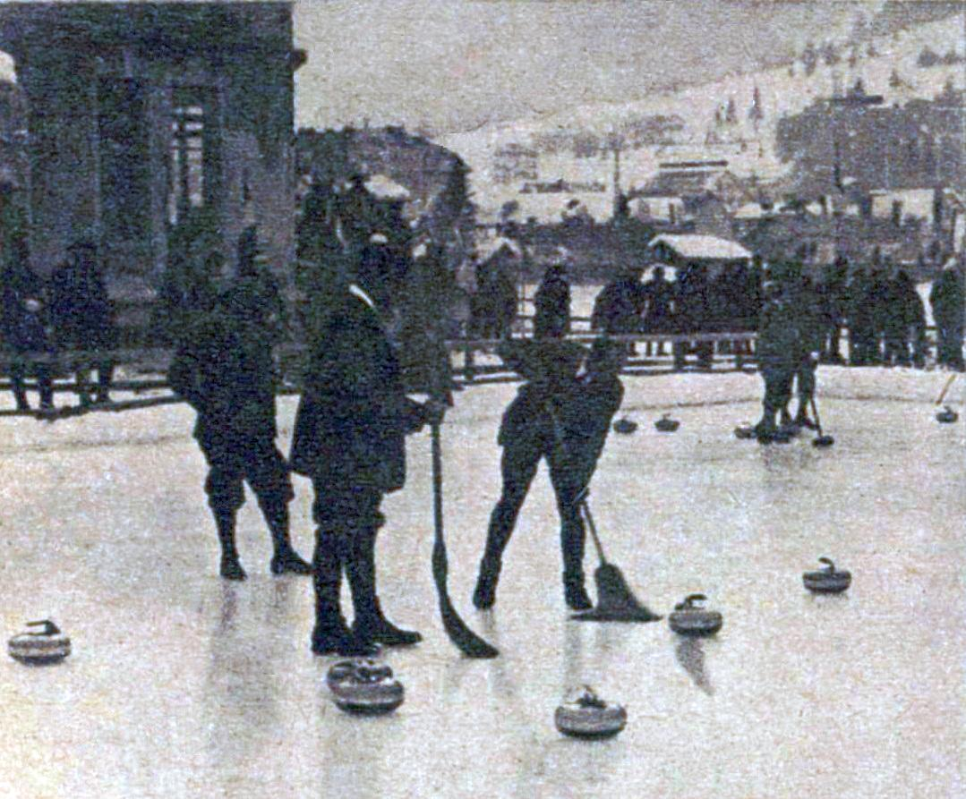 Rencontre de curling Suède-France (JO de Chamonix 1924, 18-10 le 28 janvier).